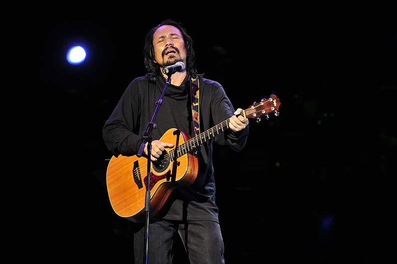 Konsert Alam Muzik M. Nasir, Istana Budaya.